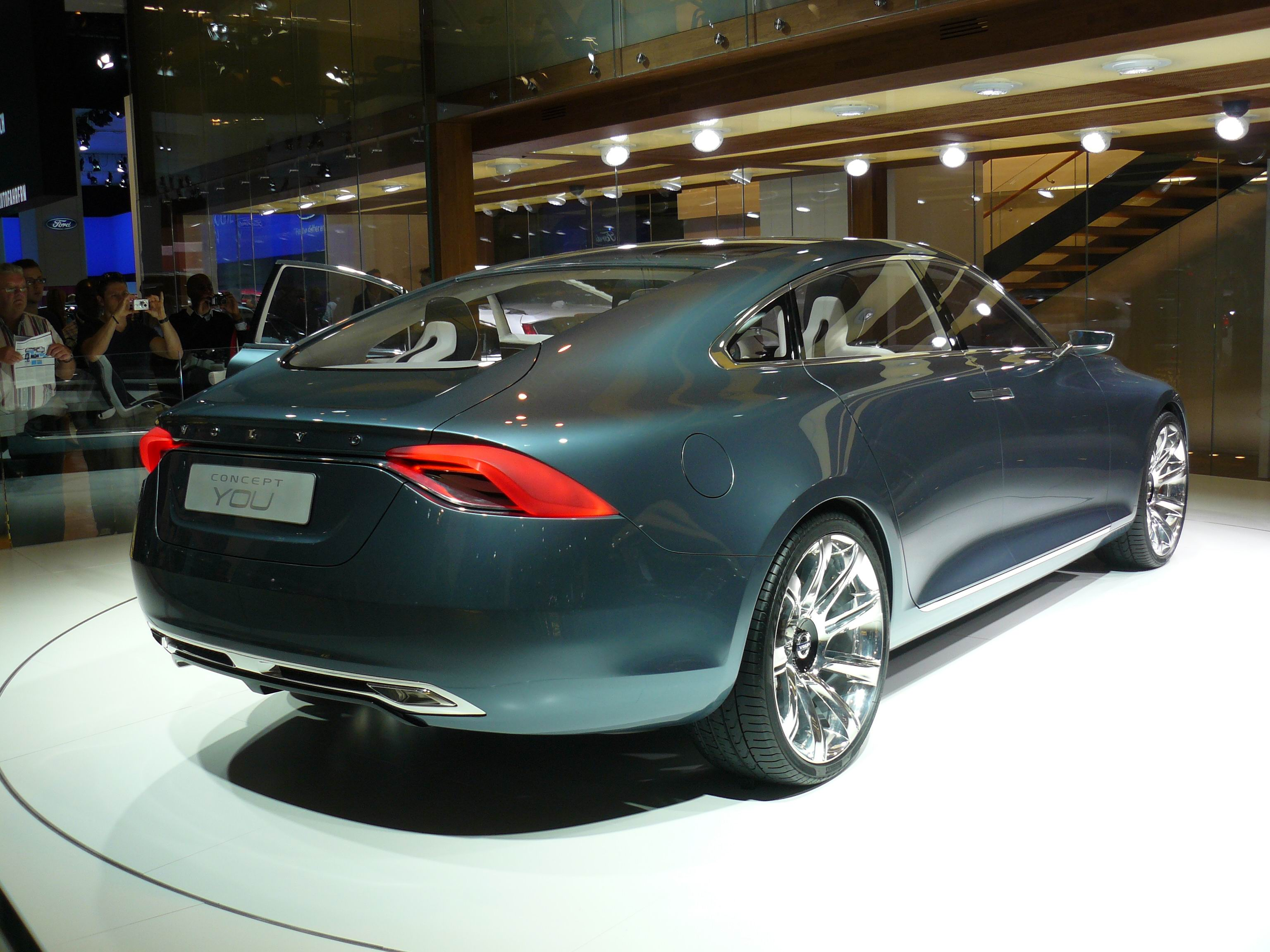 Volvo You, Francfort 2011.